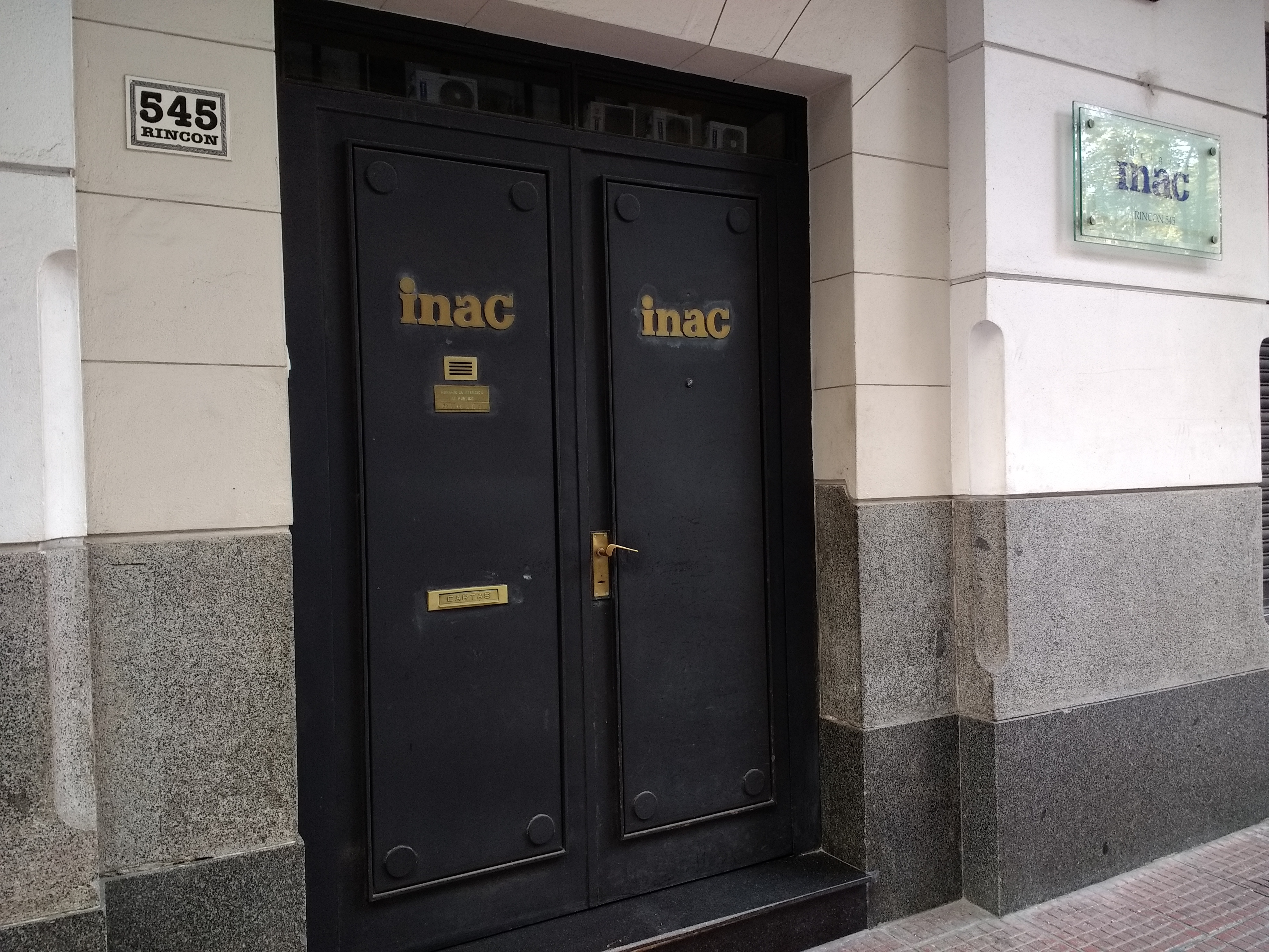 Sede del Instituto Nacional de Carnes, Rincón 545, Montevideo, Uruguay.